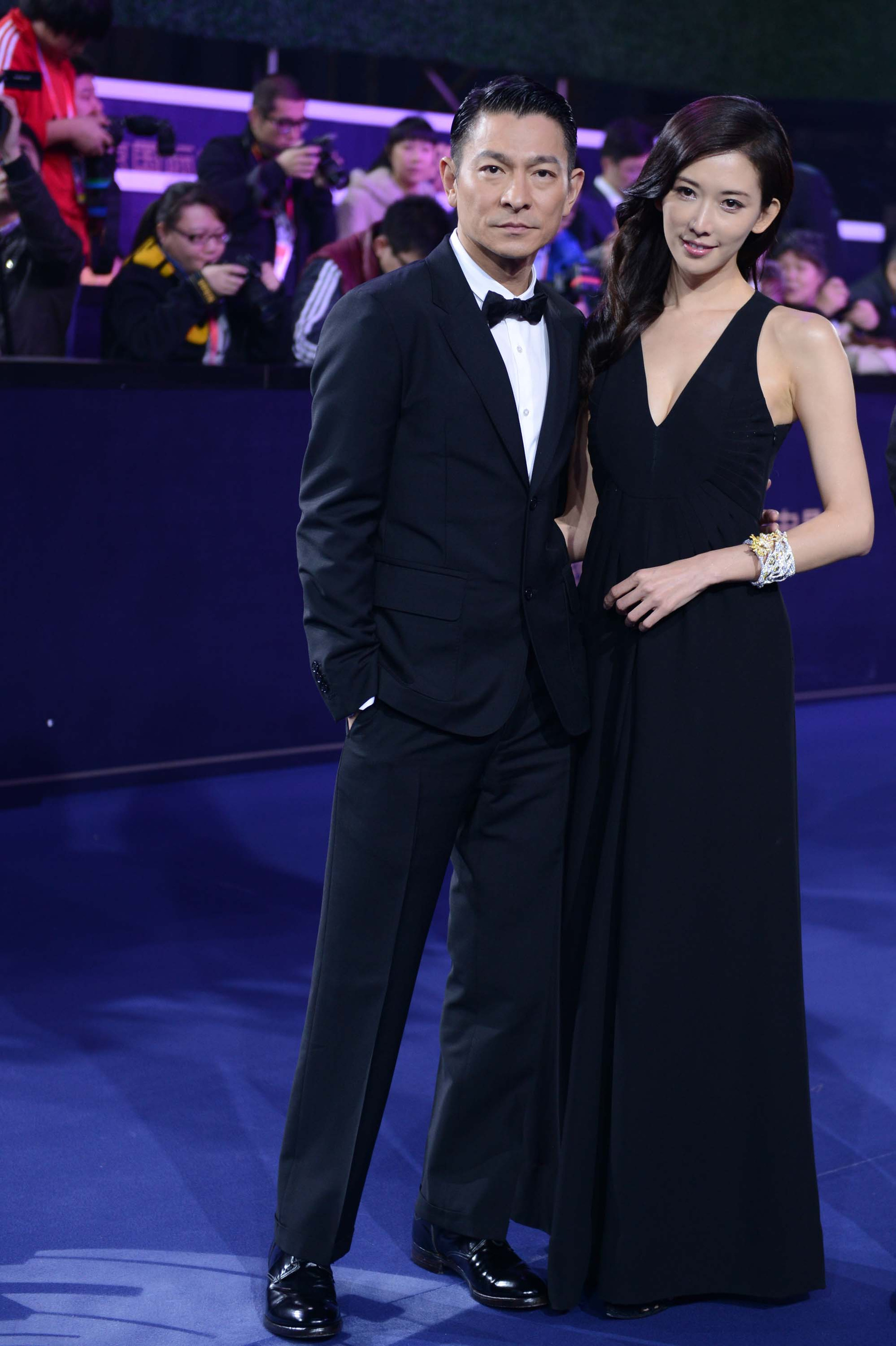 刘德华 林志玲 北京电影节